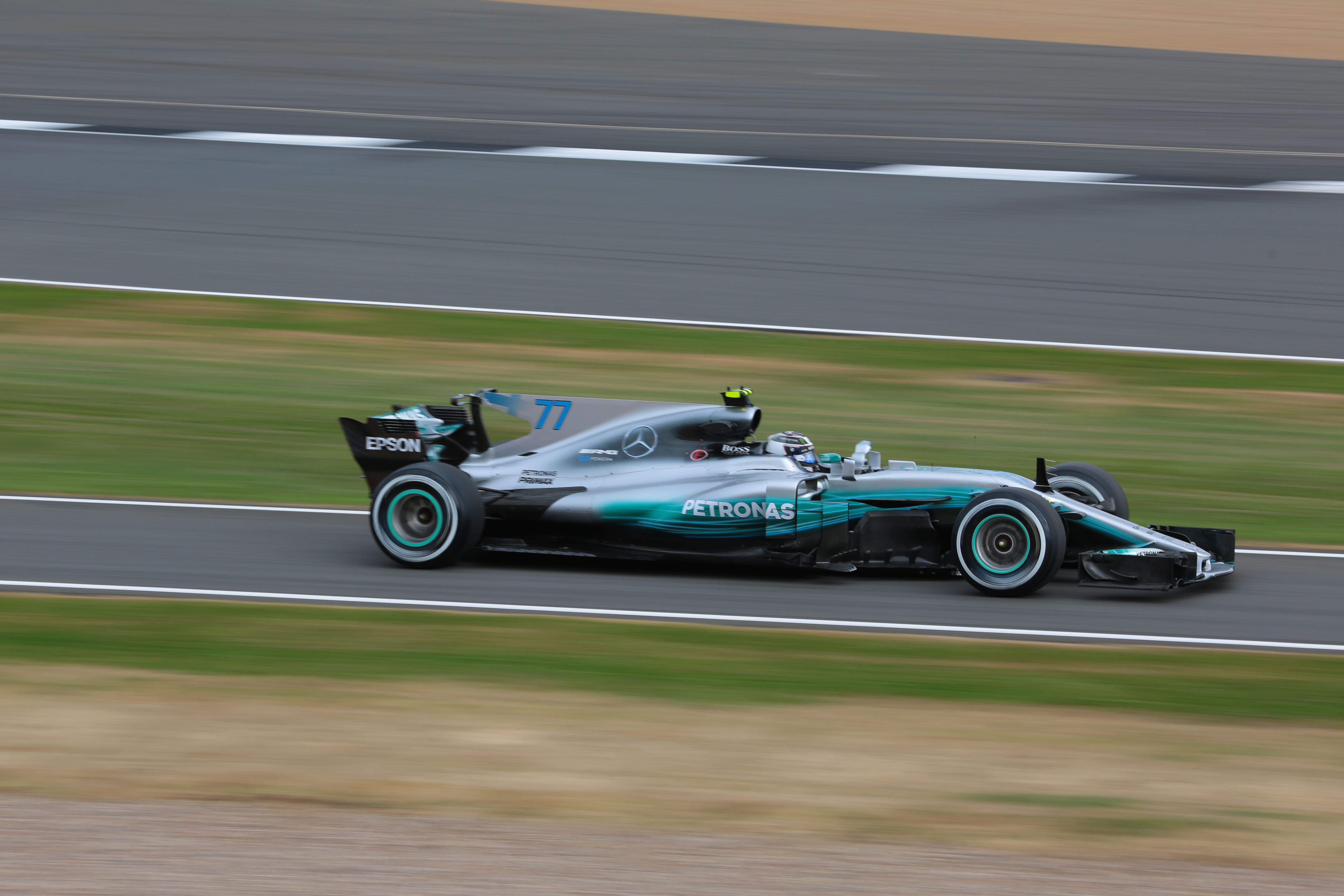 f1